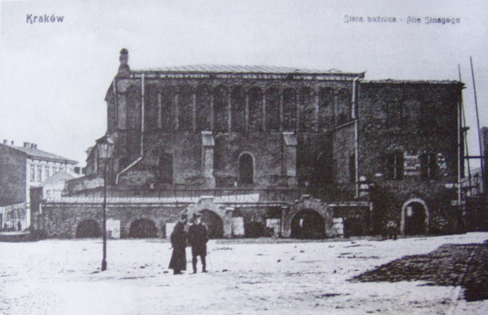 Stara Synagoga w Krakowie w 1913